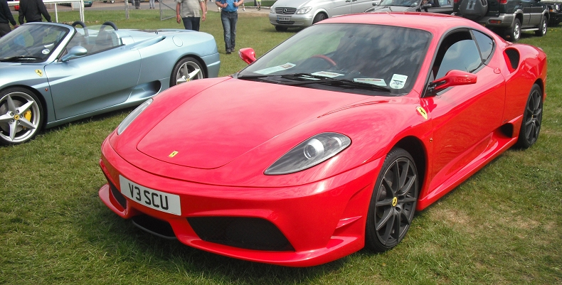 Ferrari